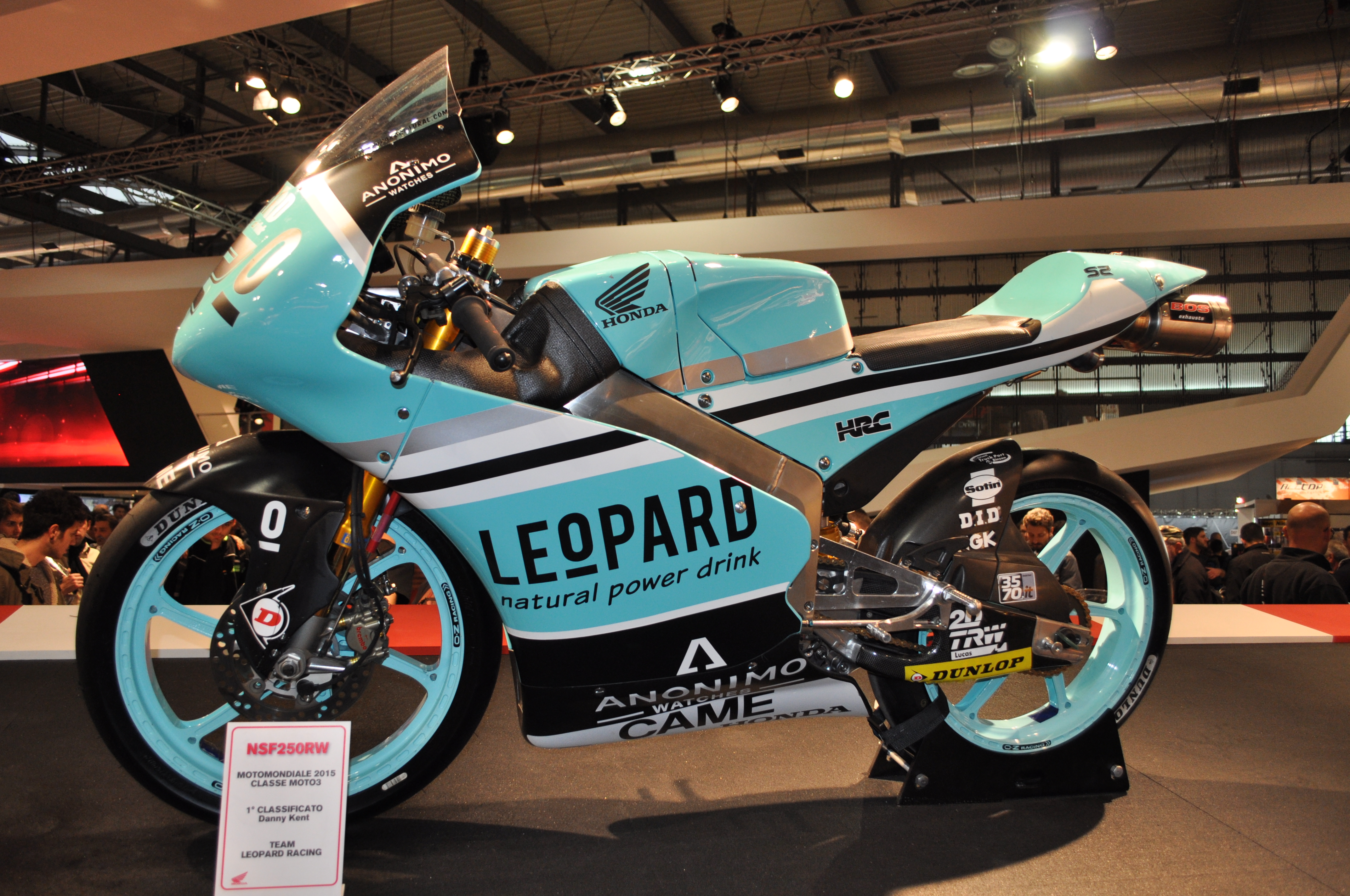 La Honda NSF250Rdel team Leopard Racing, guidata dal campione del mondo Danny Kent durante la stagione 2015 di Moto3